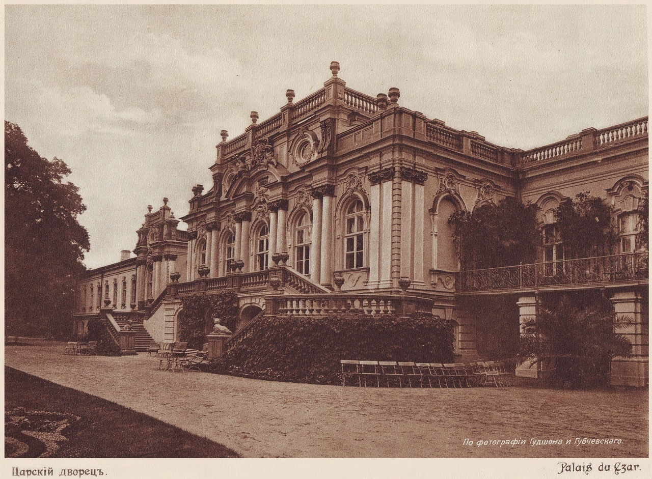 Маріїнський палац Київ 1911